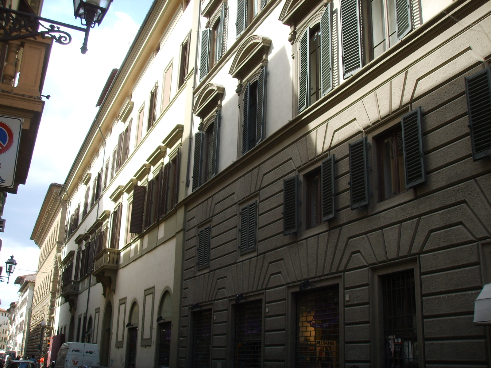 Palazzo panciatichi, retro